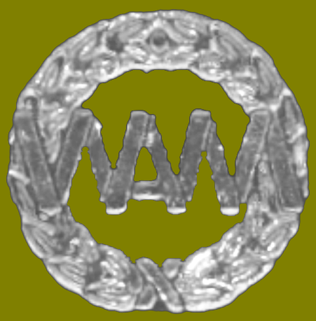 Odznaka podchorążych Wojskowej Akademii Medycznej w Łodzi, wzór z r. 1970